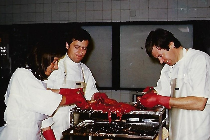 Drei Assistenzärzte bei einer Obduktion in der Essener Pathologie